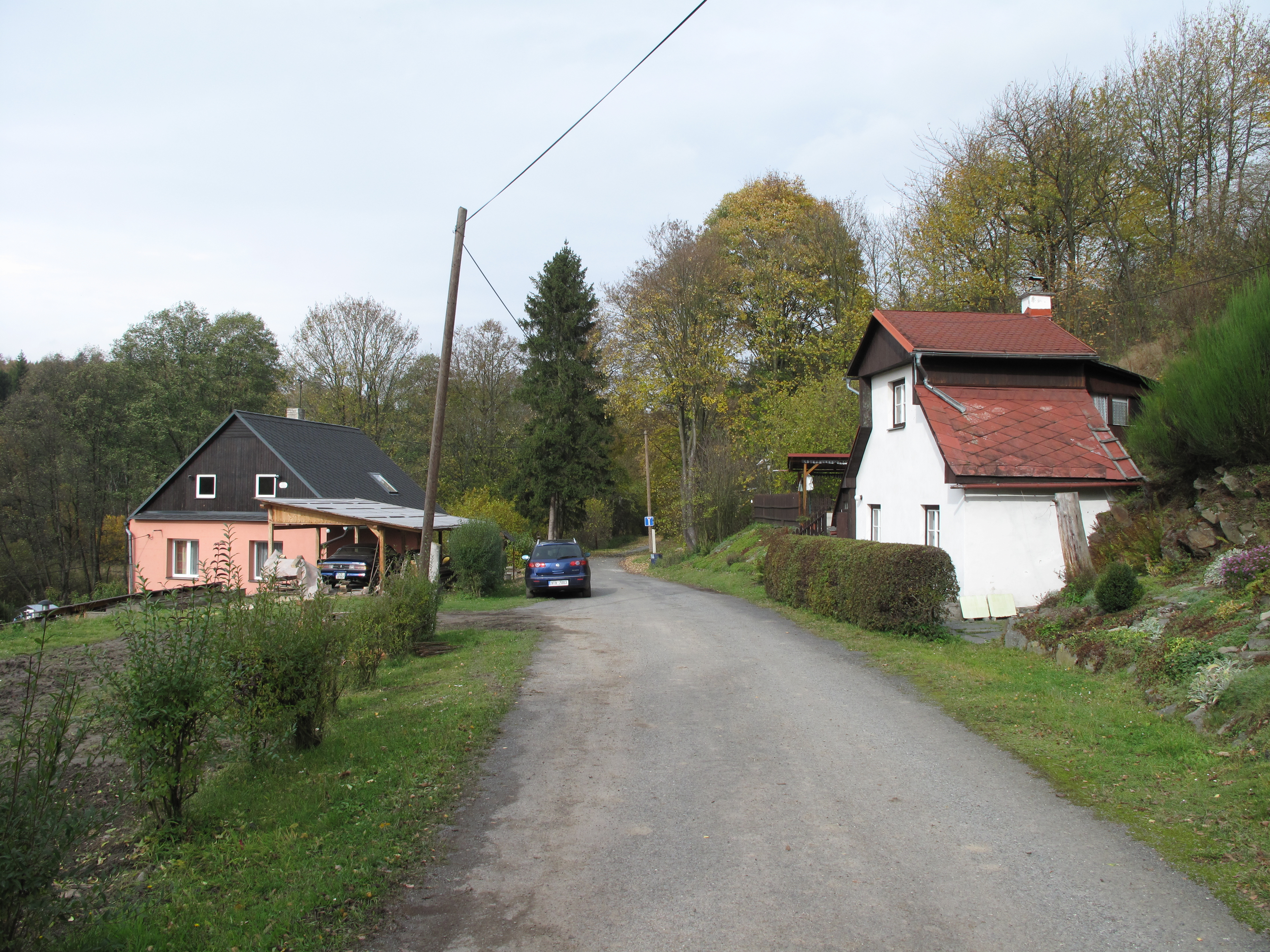 Slezská Harta (Leskovec nad Moravicí). Okres Bruntál, Česká republika.